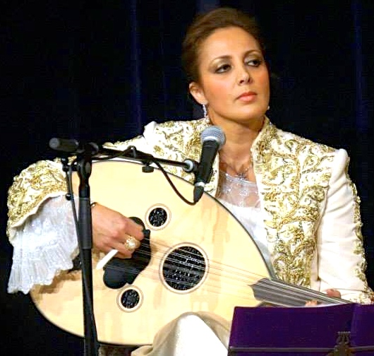 Meriem Beldi, interprète et musicienne algérienne de musique arabo-andalouse